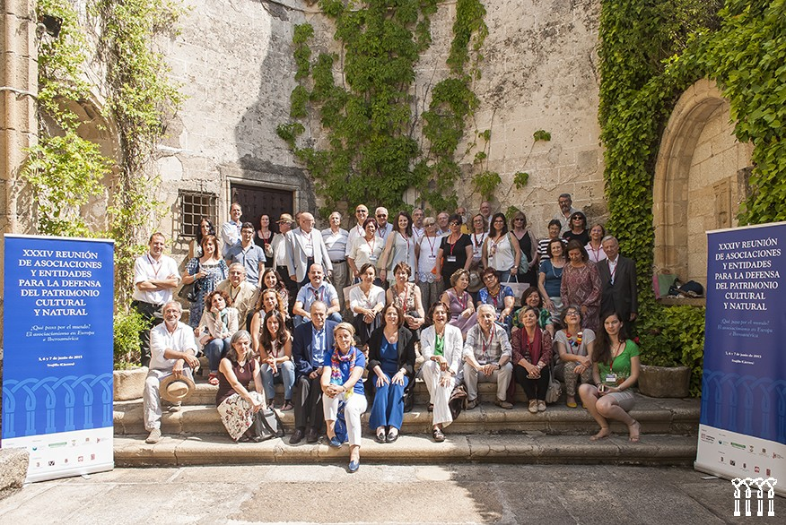 Los asistentes a la XXXIV Reunión de Asociaciones y entidades para la defensa del Patrimonio 2015 en el convento de la Coria (Trujillo)